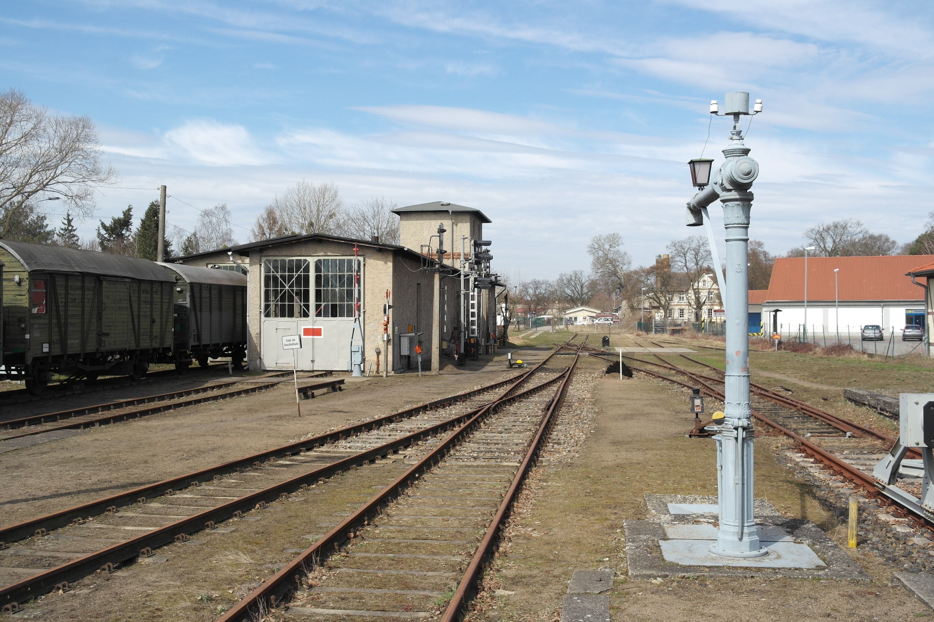 Bahnhof Rheinsberg (Mark);Kulturdenkmal, Lokschuppen und Wasserkran